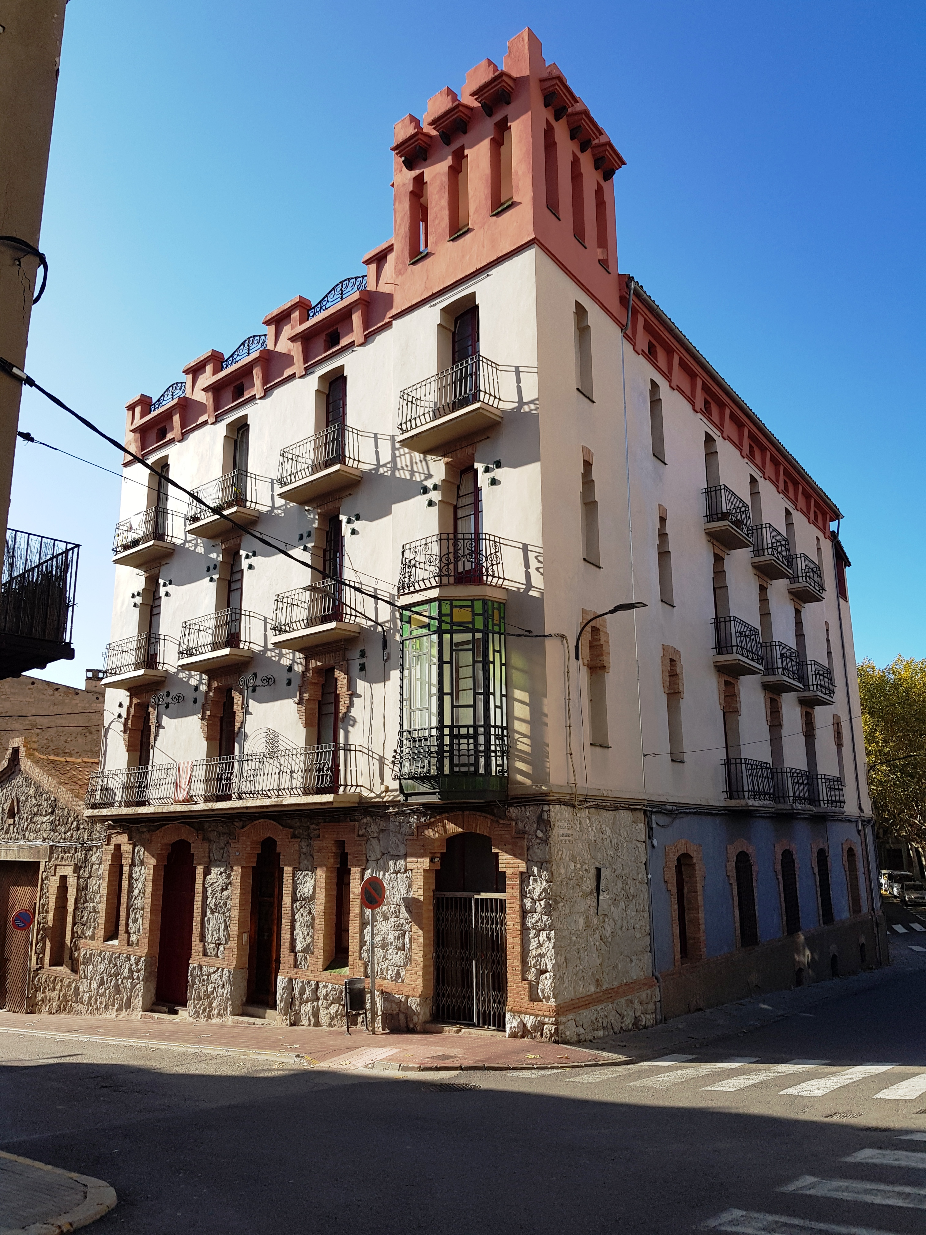 Habitatge estructurat en planta baixa i tres pisos superiors amb façanes a la ronda de Queralt i al passeig de les Estaselles. La casa correspon a una construcció de principis del segle XX.